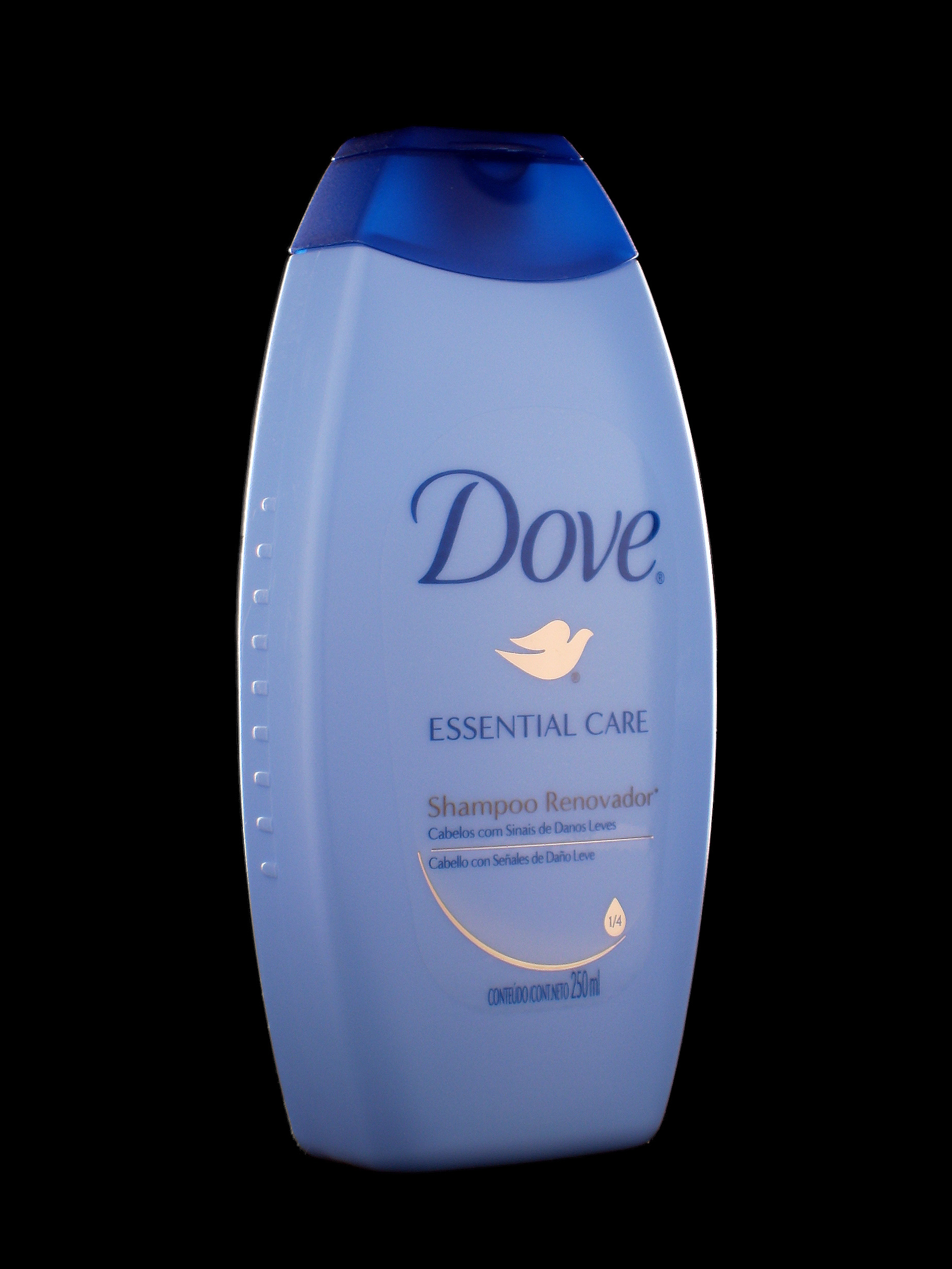 Botella de Champú para el cabello Dove Essential Care, fabricado en Brasil por Unilever.